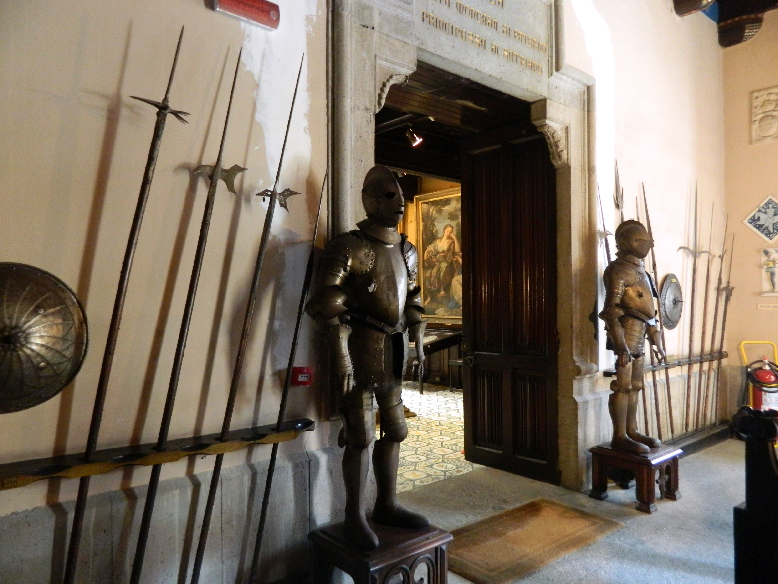 Museo Civico Gaetano Filangieri (Palazzo Como), Napoli.